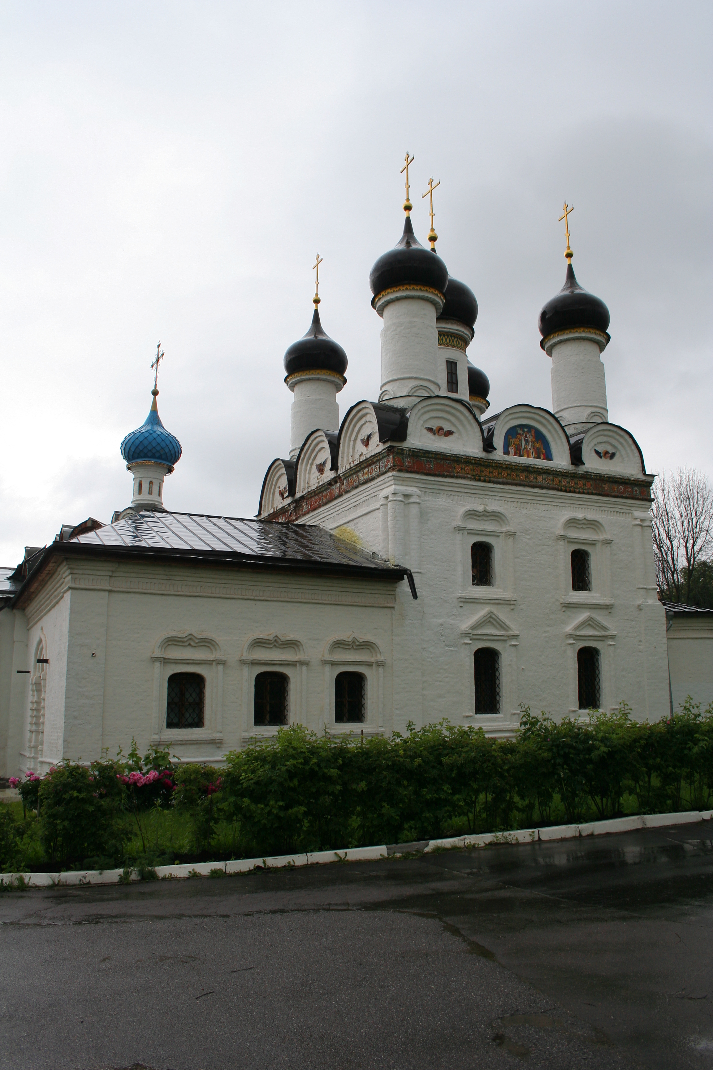 Kirche des Schutzes und der Fürbitte Mariä zu Bratzewo, Moskau.